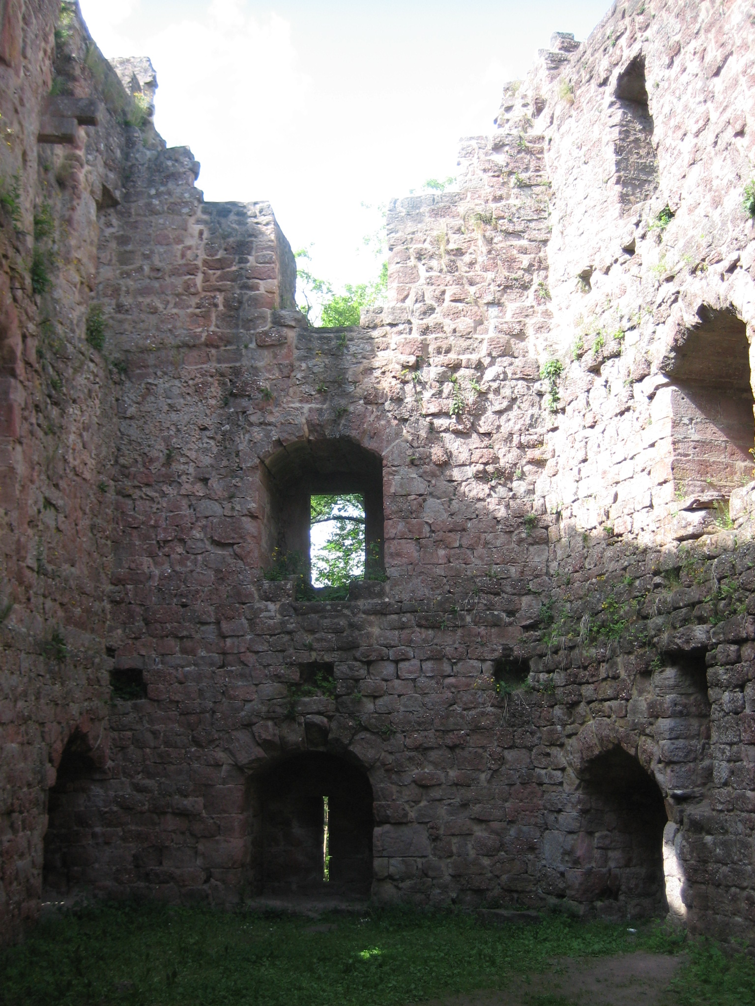 Château du Birkenfels dans la forêt d'Obernai (France)